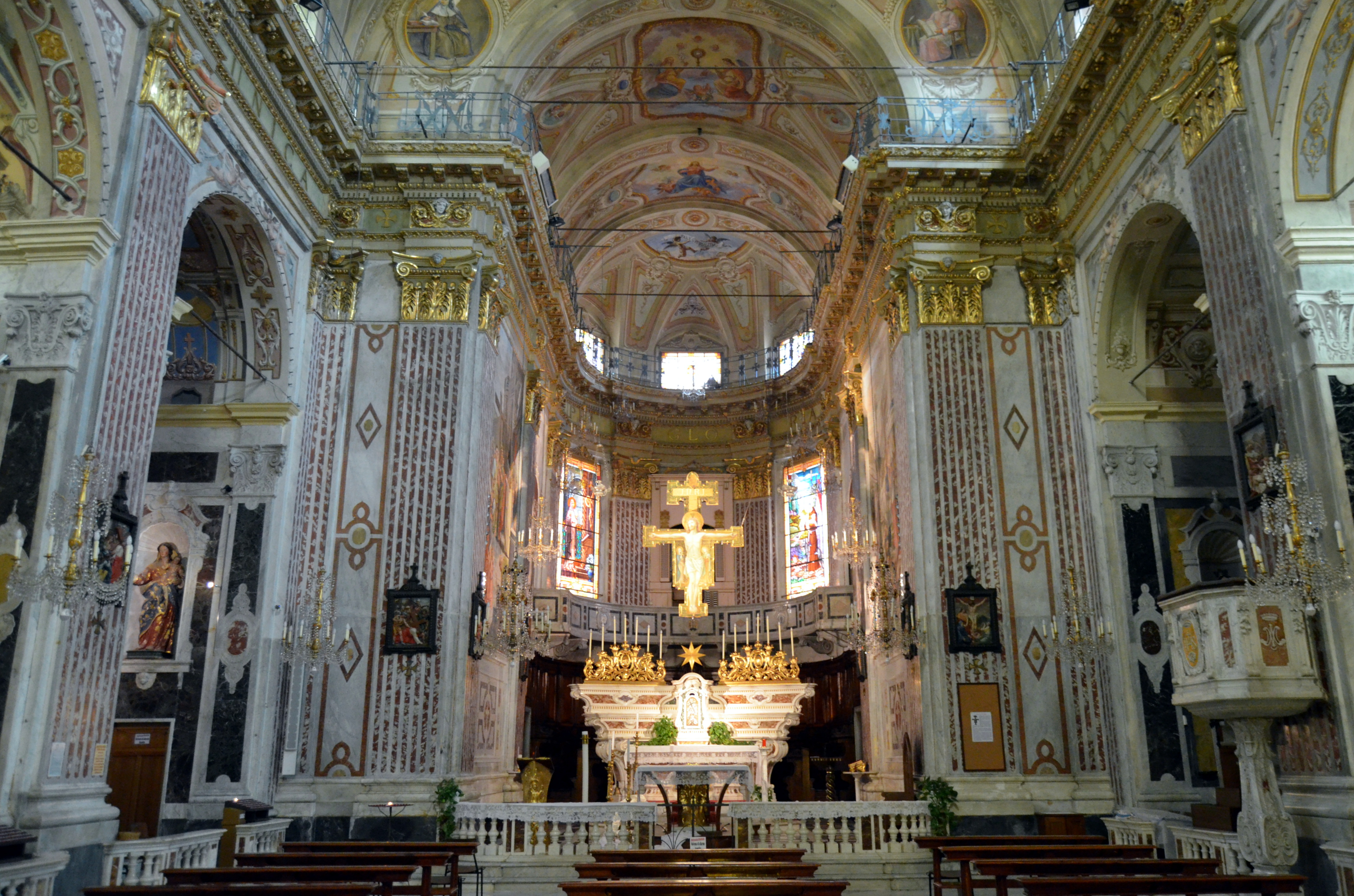 Chiesa di Santa Croce di Moneglia, Liguria, Italia